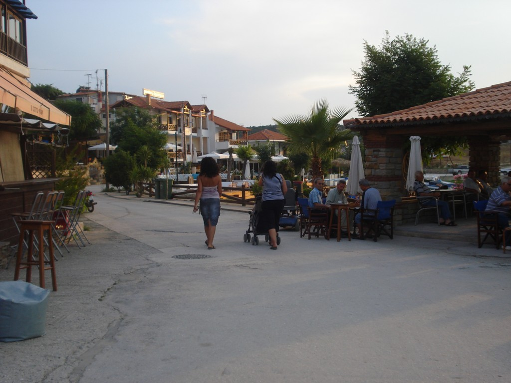 Ammouliani - Chalcidice - Greece